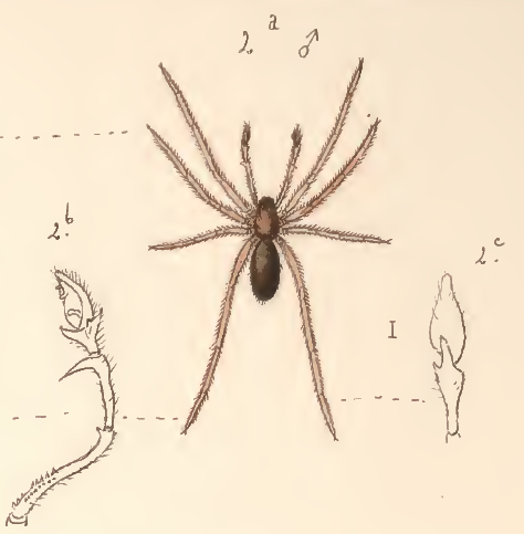 Illustrazione di un maschio di Erigone longipalpis da: Becker, L. (1896). Les arachnides de Belgique. Annales du Musée Royal d'Histoire Naturelle de Belgique 12: 1-378.